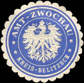 Sealing stamp Title: Amt - Zwochen Kreis - Delitzsch Description: blau, weiß, geprägt Place: Zwochen size: 4 cm